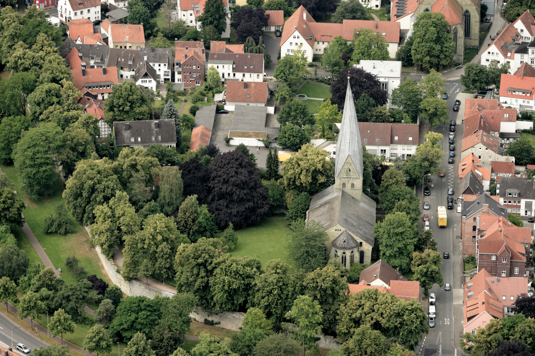 Fotoflug Sauerland Nord. Soest: Alt St. Thomae. The making of this document was supported by the Community-Budget of Wikimedia Germany.